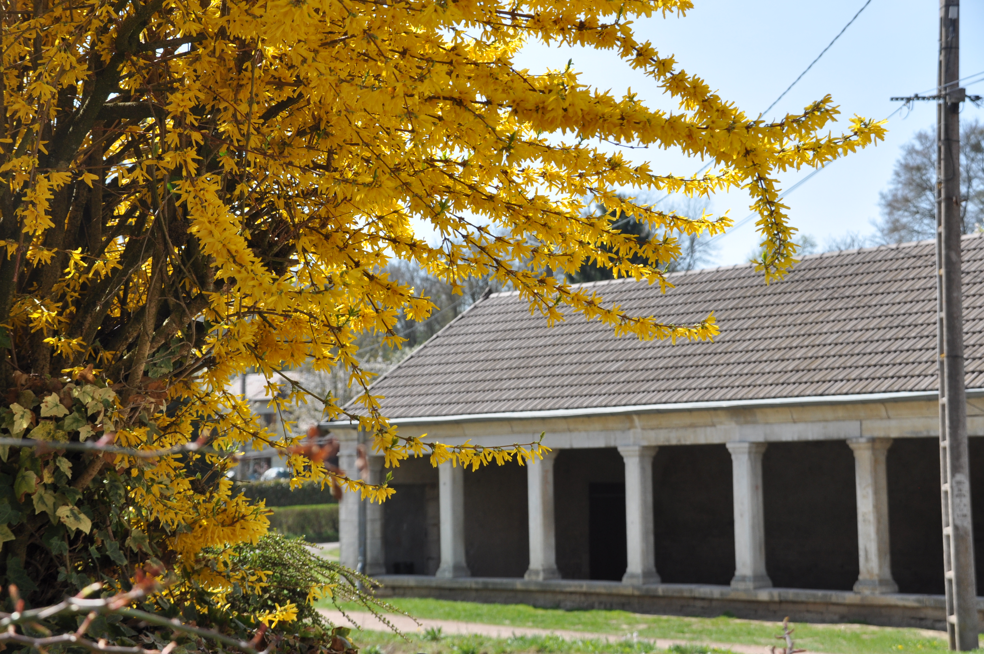 Fontaine-lavoir de Montagney, (Inscrit, 1986) .